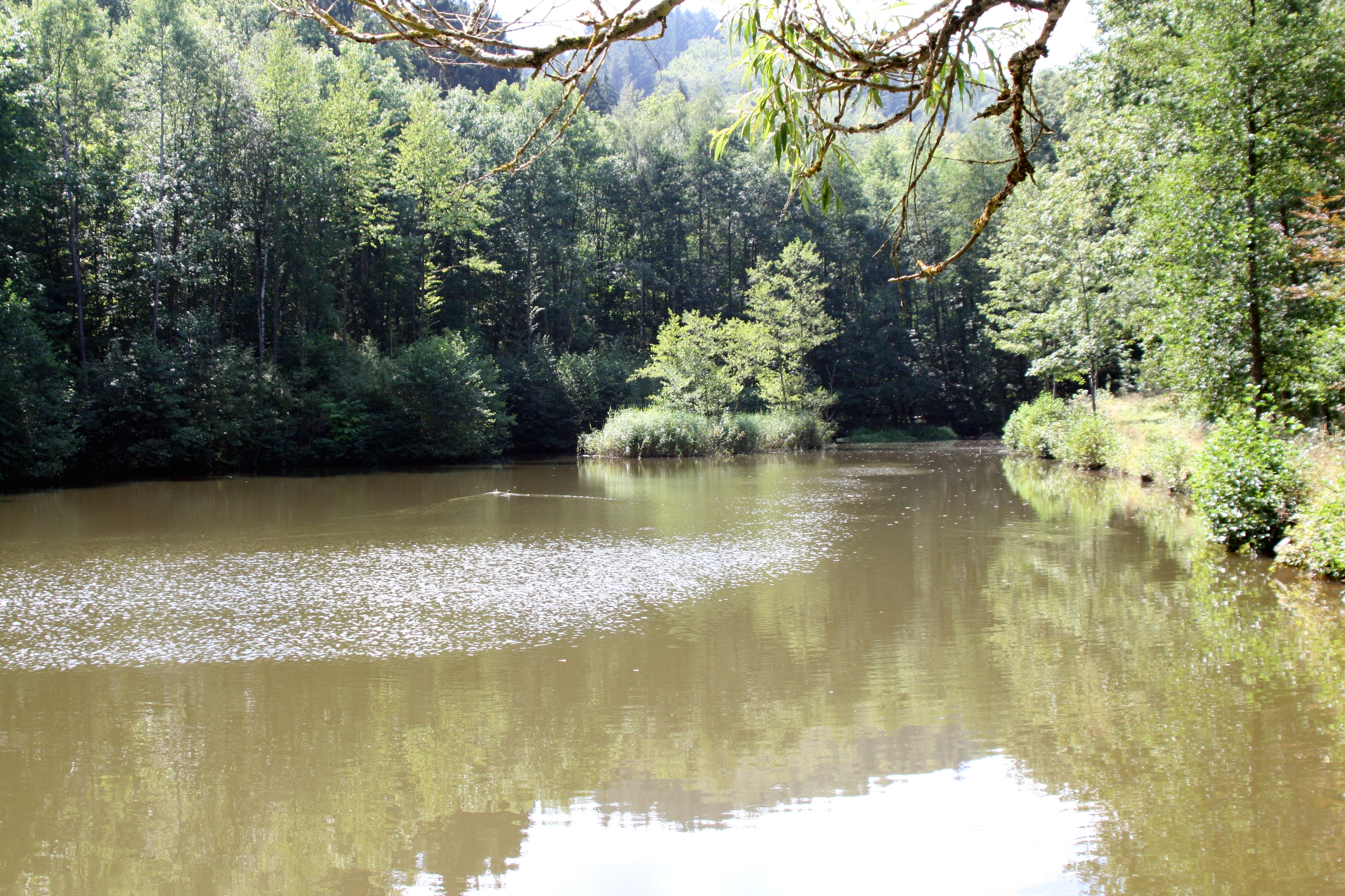 Der Bernsee im Tal des Bernbachs, Gemarkung Wüstenrot. Blickrichtung Südwesten